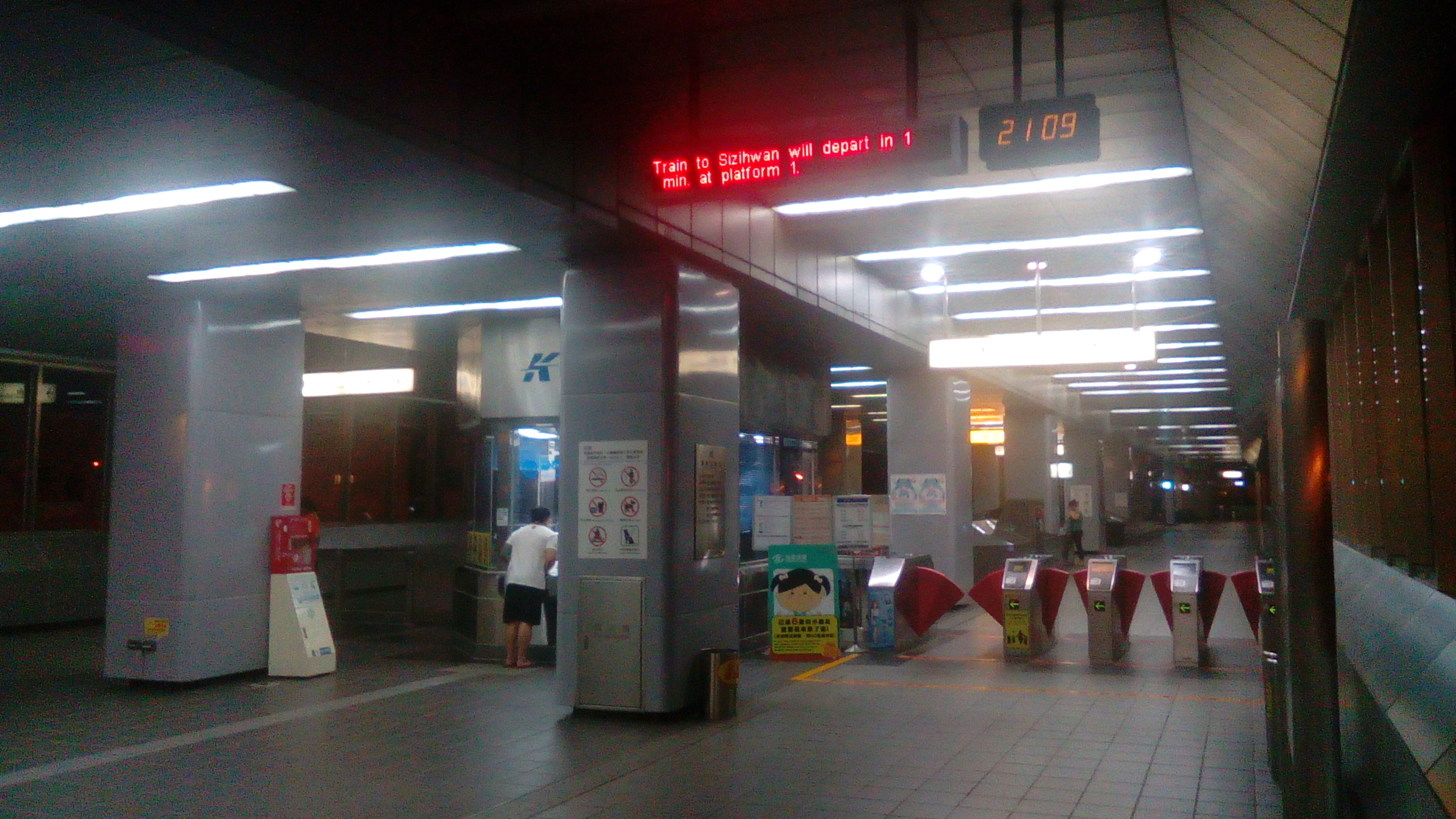 高雄捷運大寮站二樓售票區